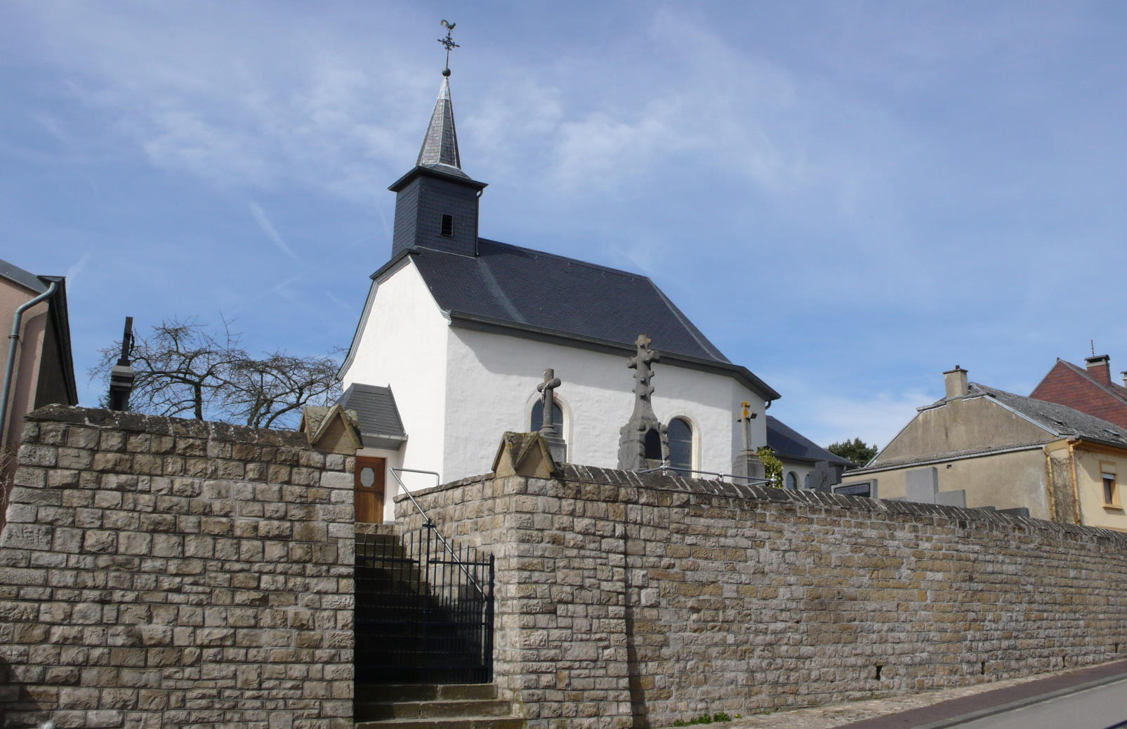 D'Kapell